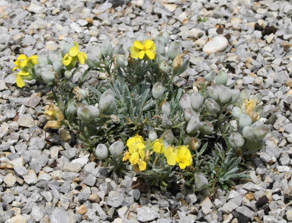 Velebitska degenija, snimljeno u Botaničkom vrtu u Zagrebu.